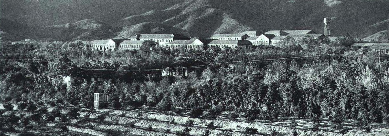 1965-3 1965年 江西共产主义劳动大学